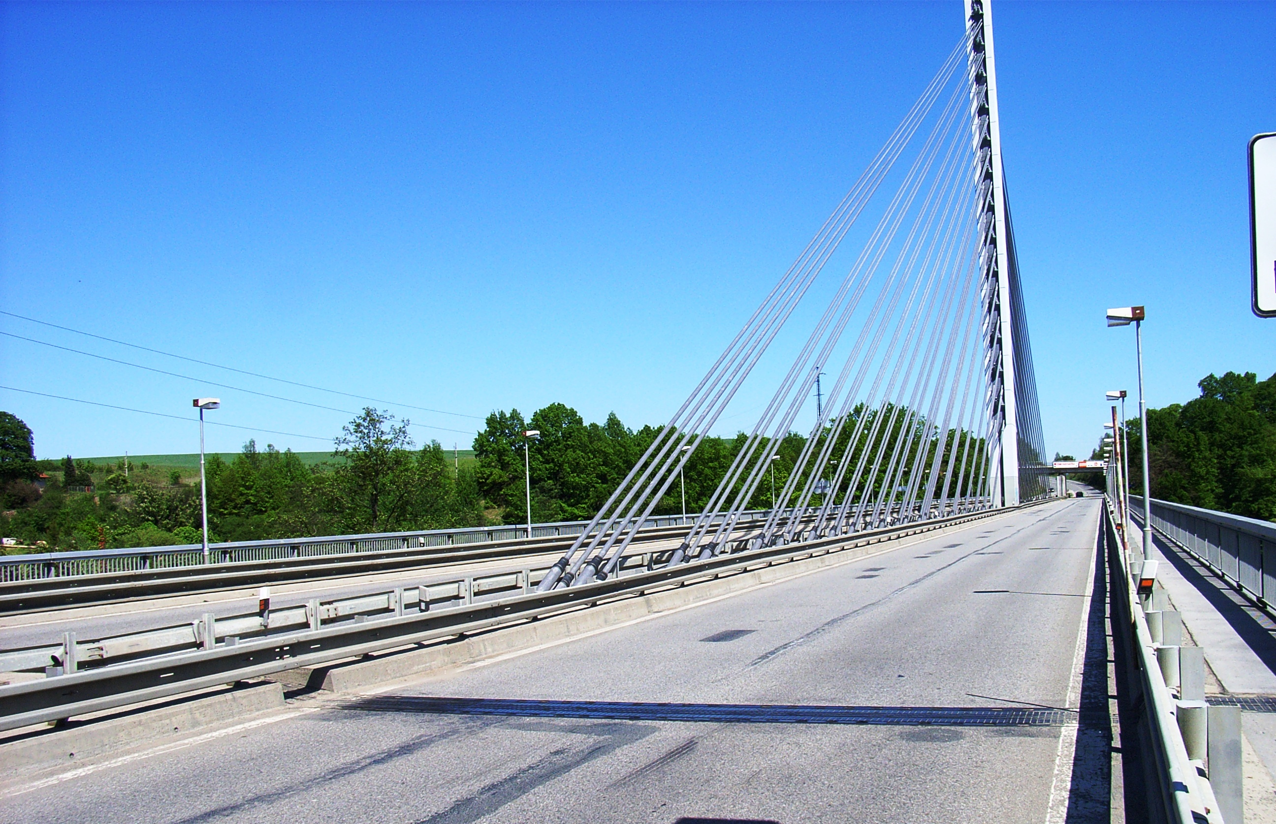 Tábor - harfový most přes Jordán ( otevřen roku 1991), pohled na mostovku, zavěšenou na jediném pylonu